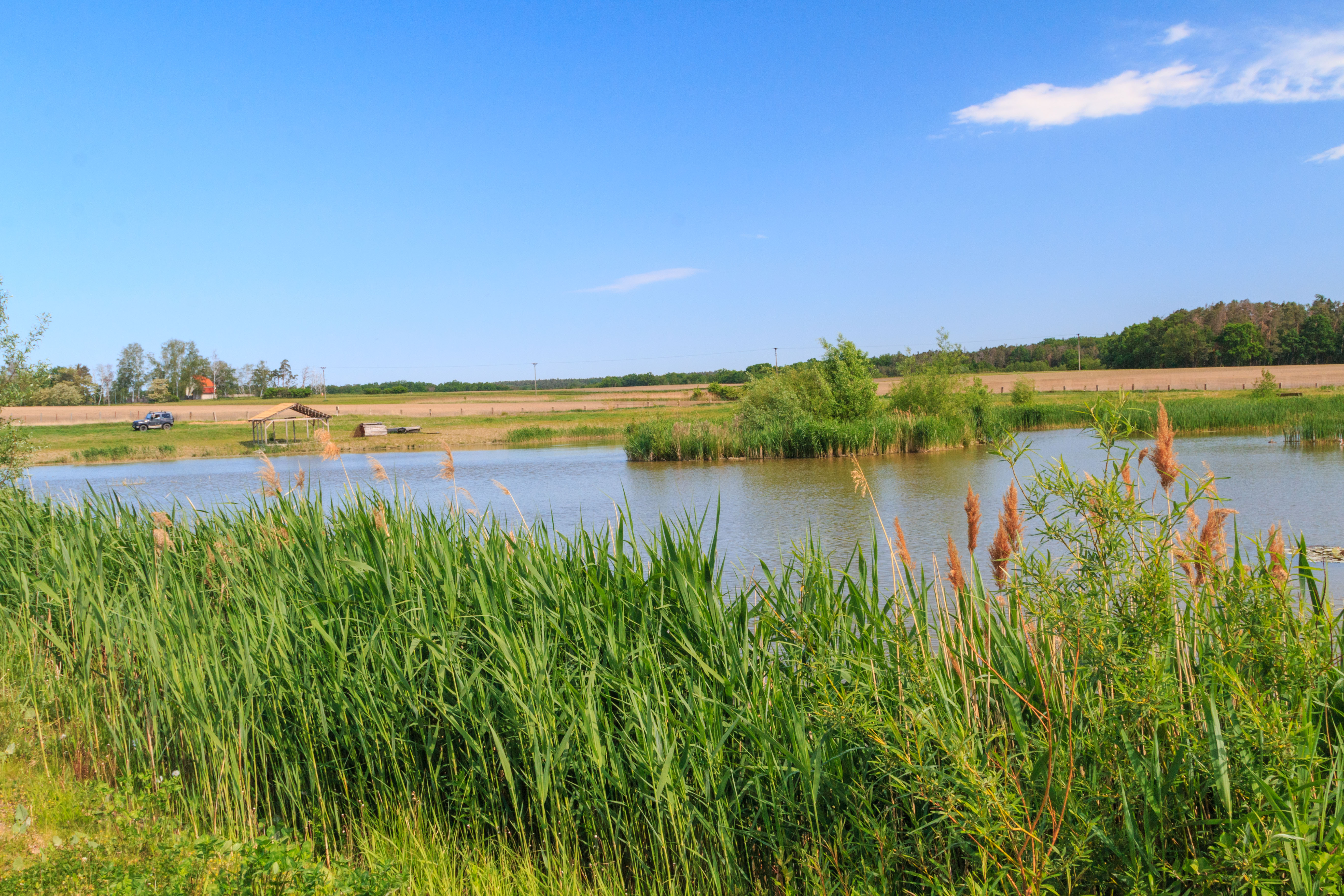 Rybník Pod Jenčovem u Borku